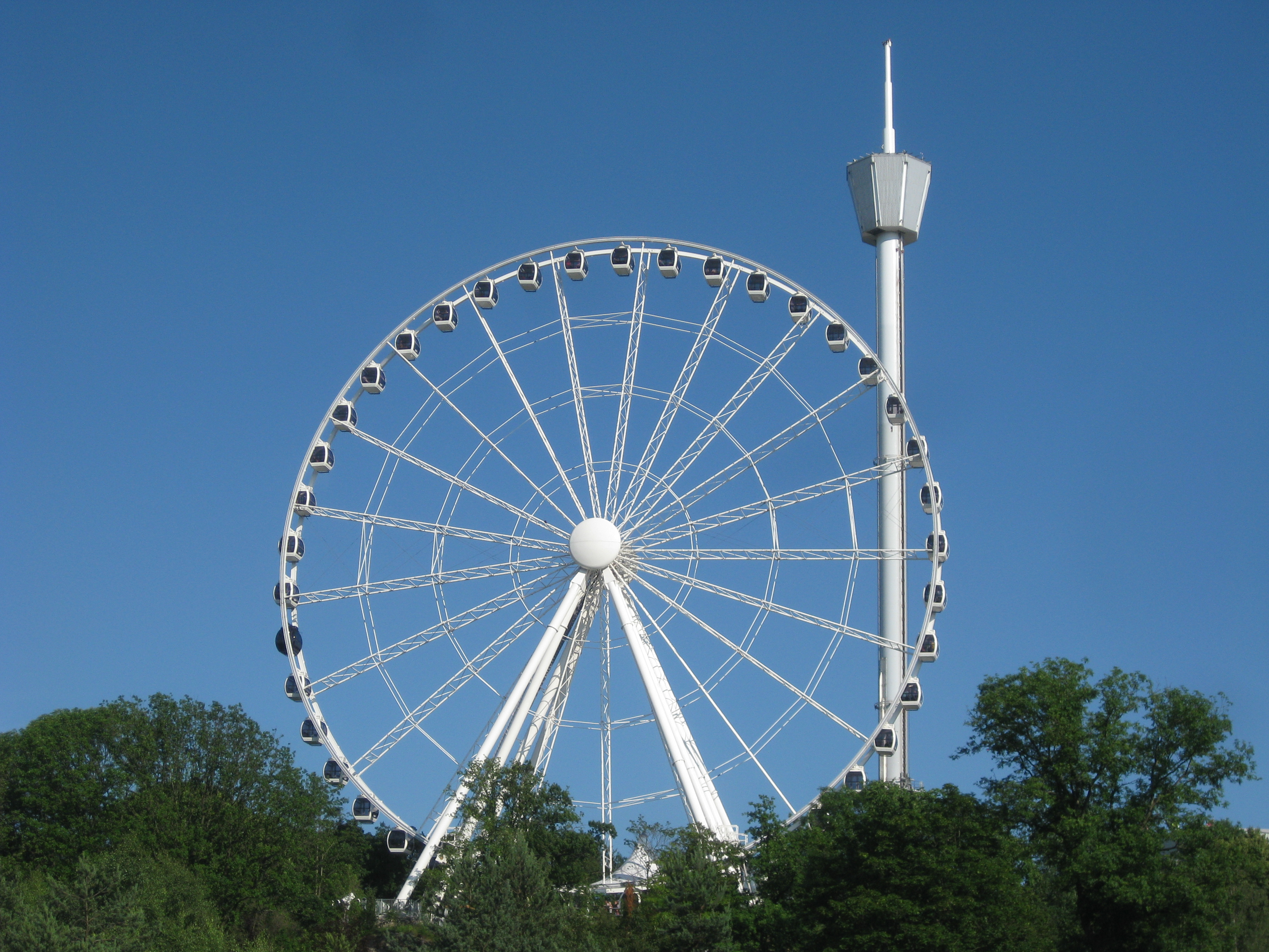 Lisebergshjulet i juni 2012.